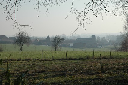 Vue du village de Baisieux (B) depuis le Bois auteur: JBLENS, 2005